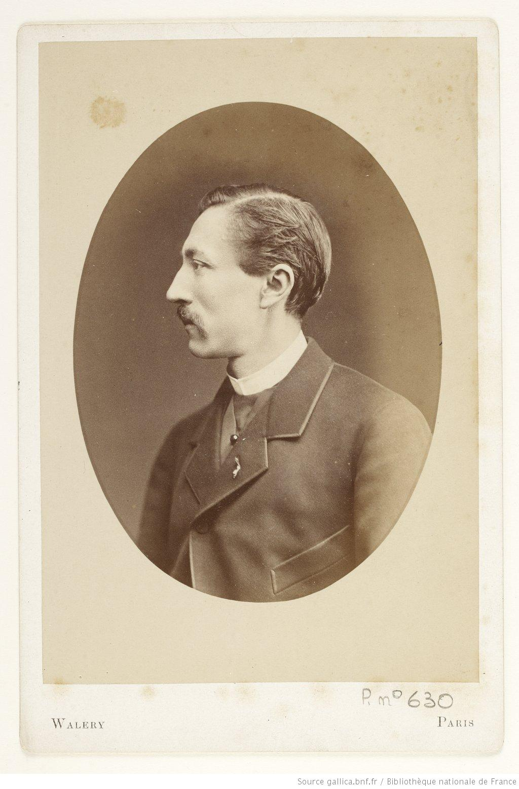 Portrait de Jean Jacques Emile Cheysson par Waléry